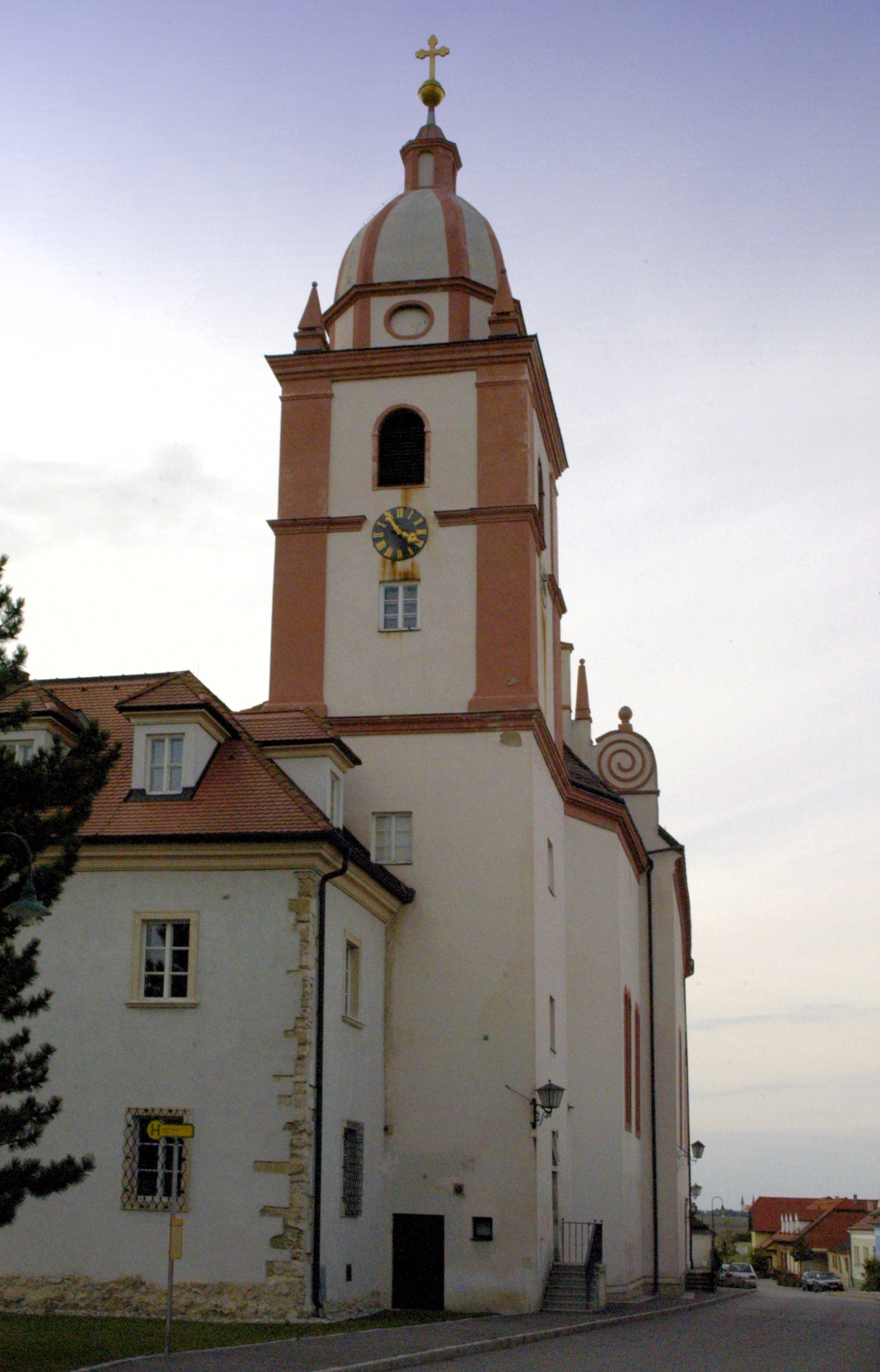 katholische Pfarrkirche, Wallfahrtskirche, Mariae Geburt in Roggendorf,Gemeinde Wullersdorf